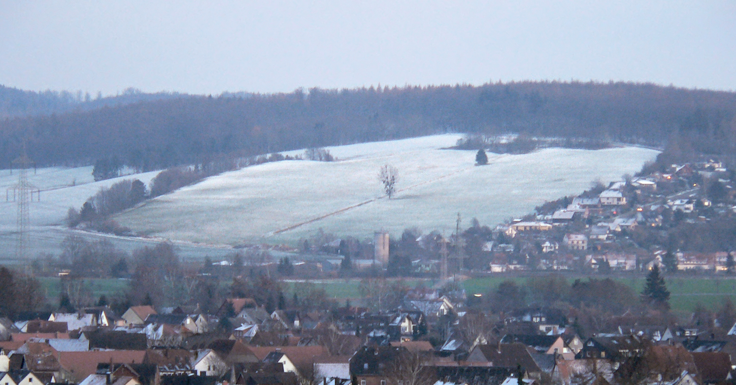 Früheres Reichserntedankfestgelände